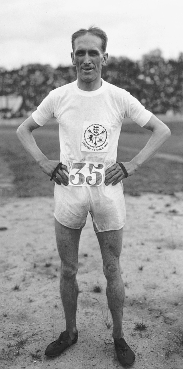 Stade Pershing, match athlétisme France-Angleterre : Britton, gagnant du 5000 m : [photographie de presse] / Agence Meurisse